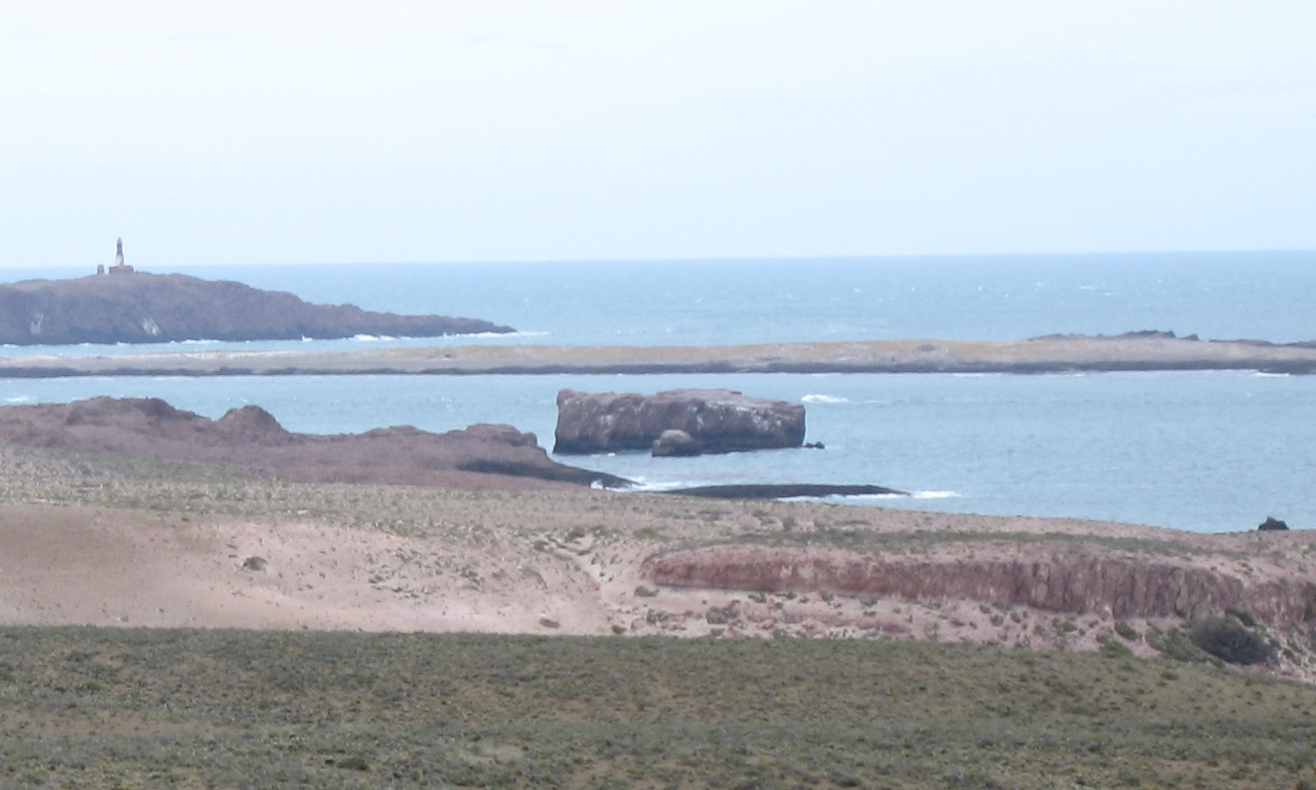 Vista de la isla Castillo, al fondo se observa Isla Pingüino (Santa Cruz, Argentina)